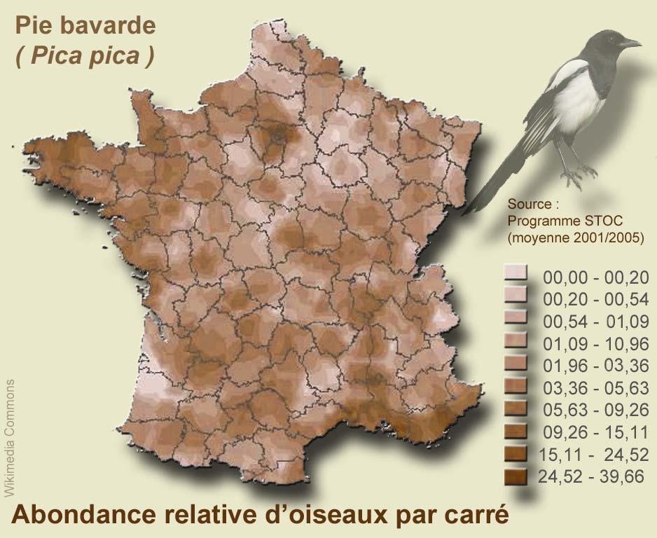 Indice de répartition/densité (malgré augmentation dans les villes) des populations d’oiseaux communs, pour la pie bavarde (Pica pica), selon le Programme STOC. Attention légende colorée de type logarithmique (permet de mieux saisir les variations dans les zones rurales)